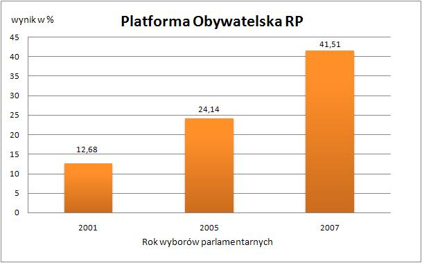 Graph presenting Civic Platform scores in Polish parliamentary elections since 2001 / Wykres wyników wyborczych Platformy Obywatelskiej w wyborach parlamentarnych, począwszy od 2001 roku